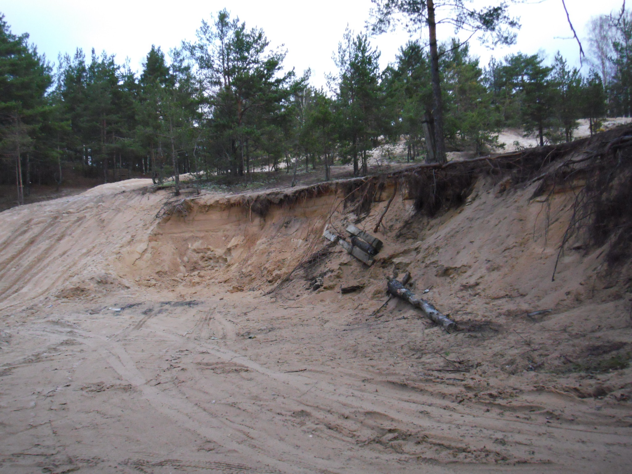 Сестрорецк на берегах Ржавой канавы